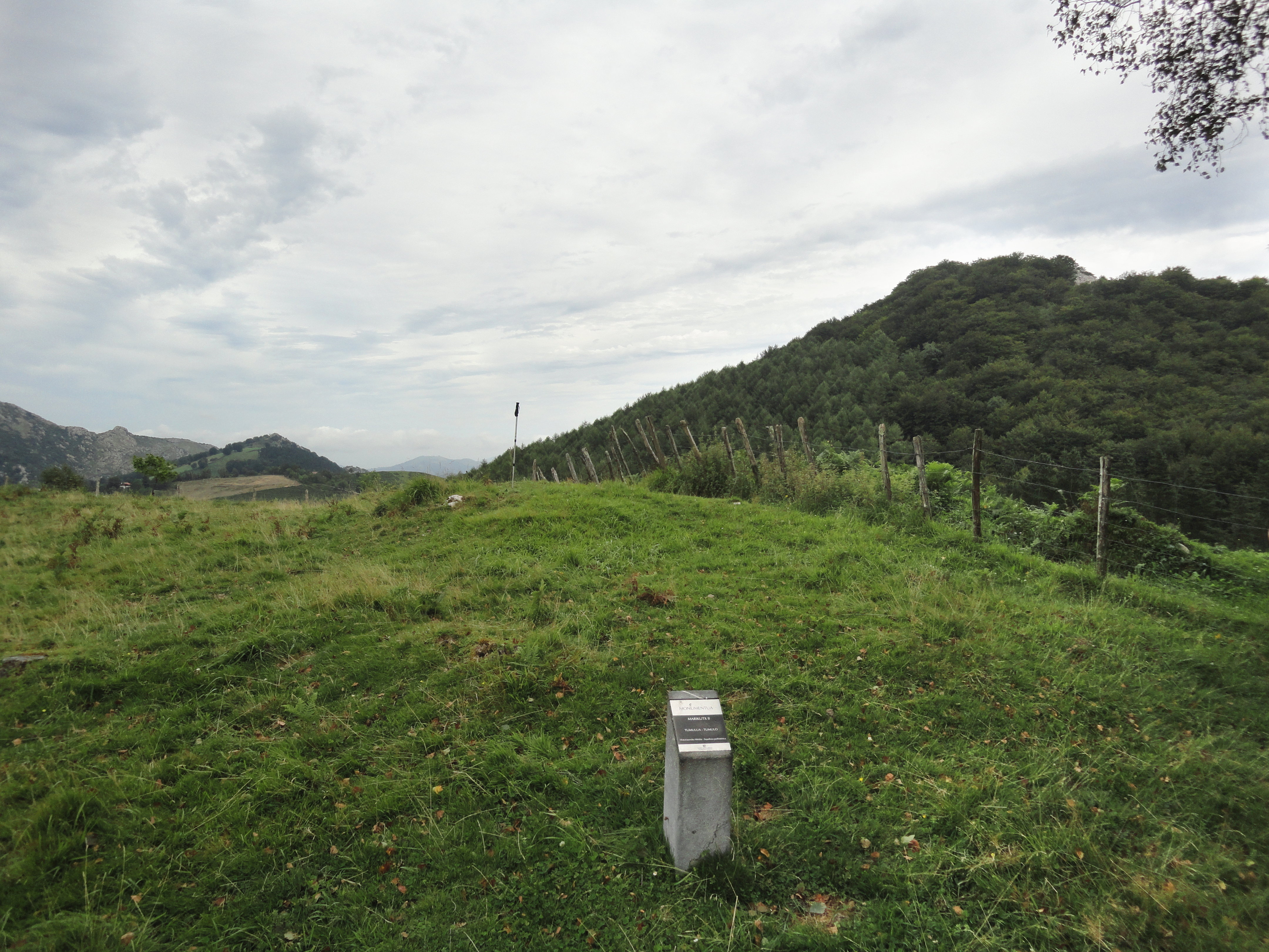 Marikutx II tumulua